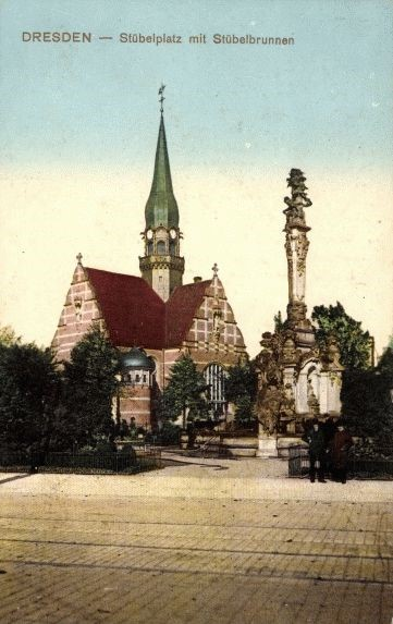 La colegiata y la fuente Stübel. Ambos ya no pertenecen.